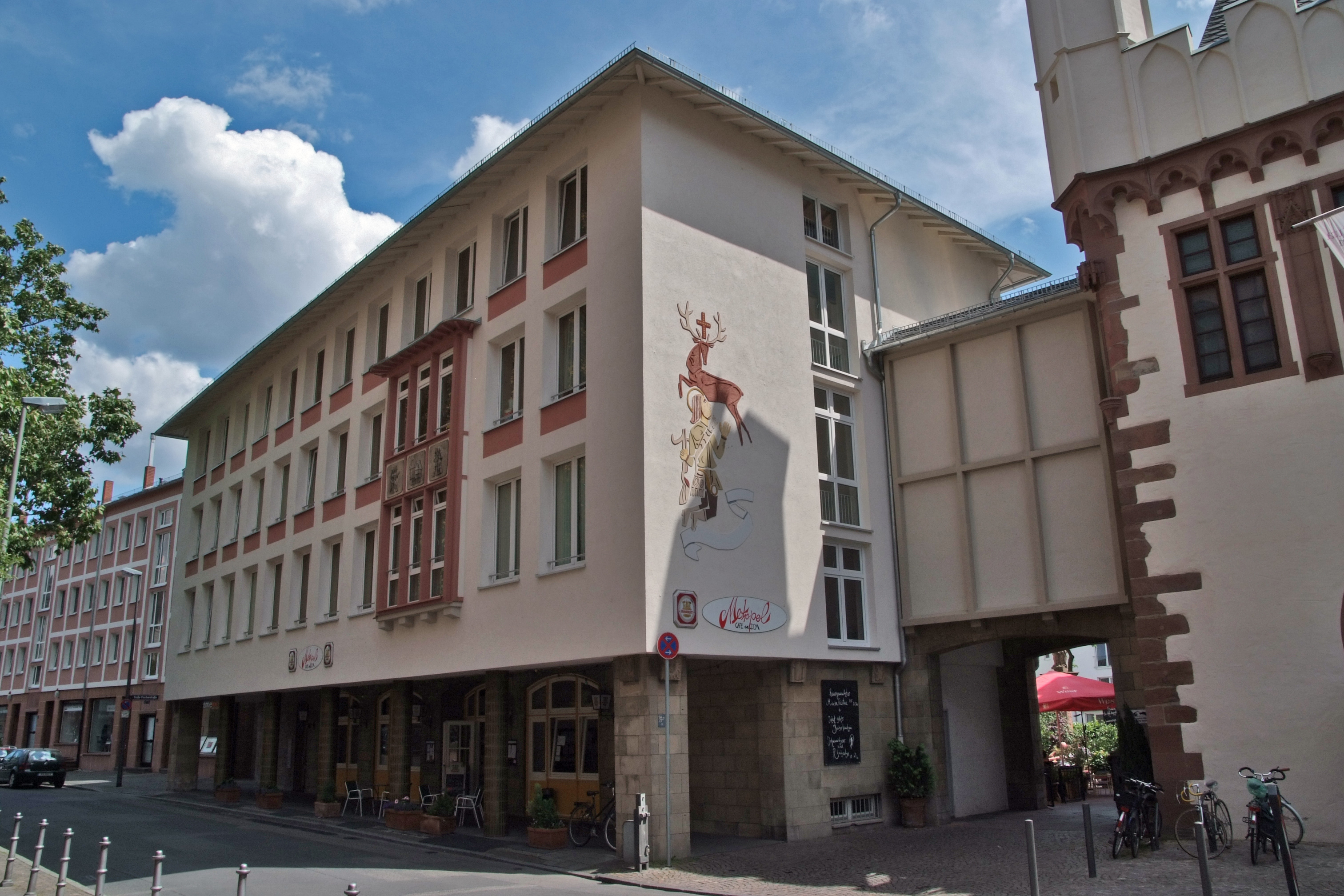 Metropol am Dom